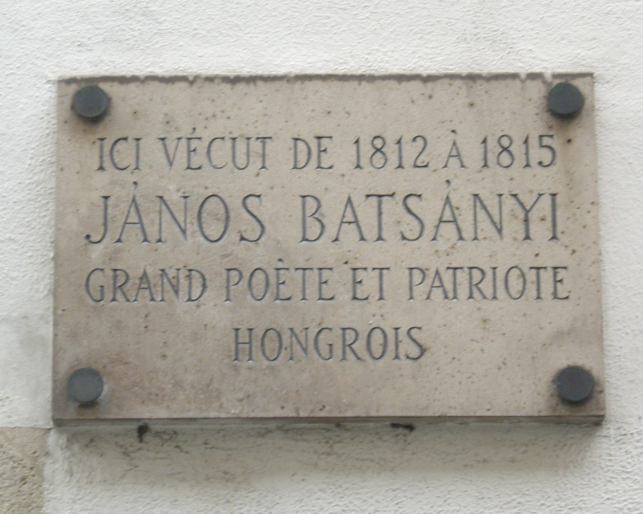 Plaque apposée au n° 30 de la rue Mazarine, Paris 6e, où vécut le poète et patriote János Batsányi (1763-1845) de 1812 à 1815.